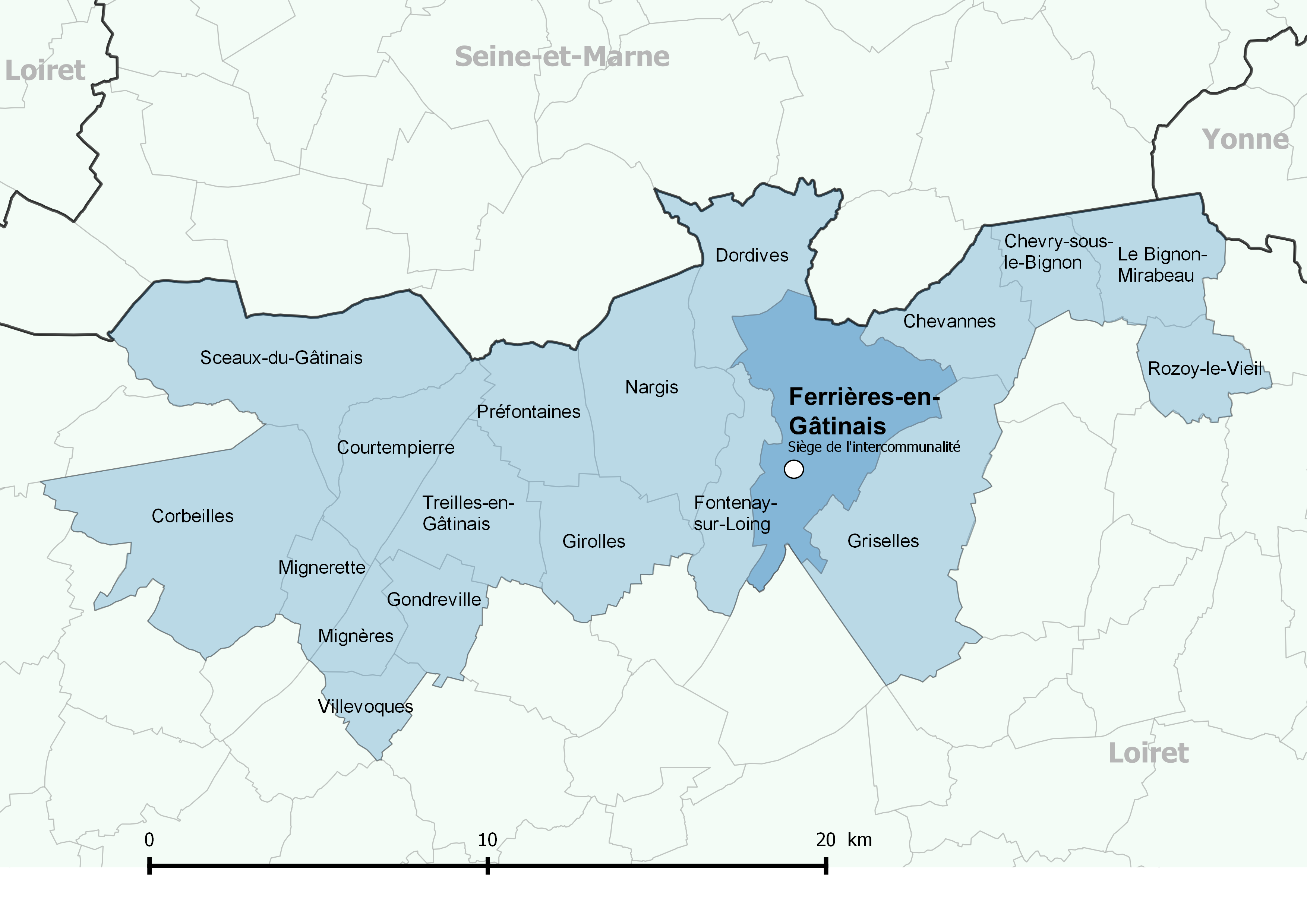 Périmètre de la communauté de communes des Quatre Vallées (Loiret) - Positionnement de la commune de Ferrières-en-Gâtinais.